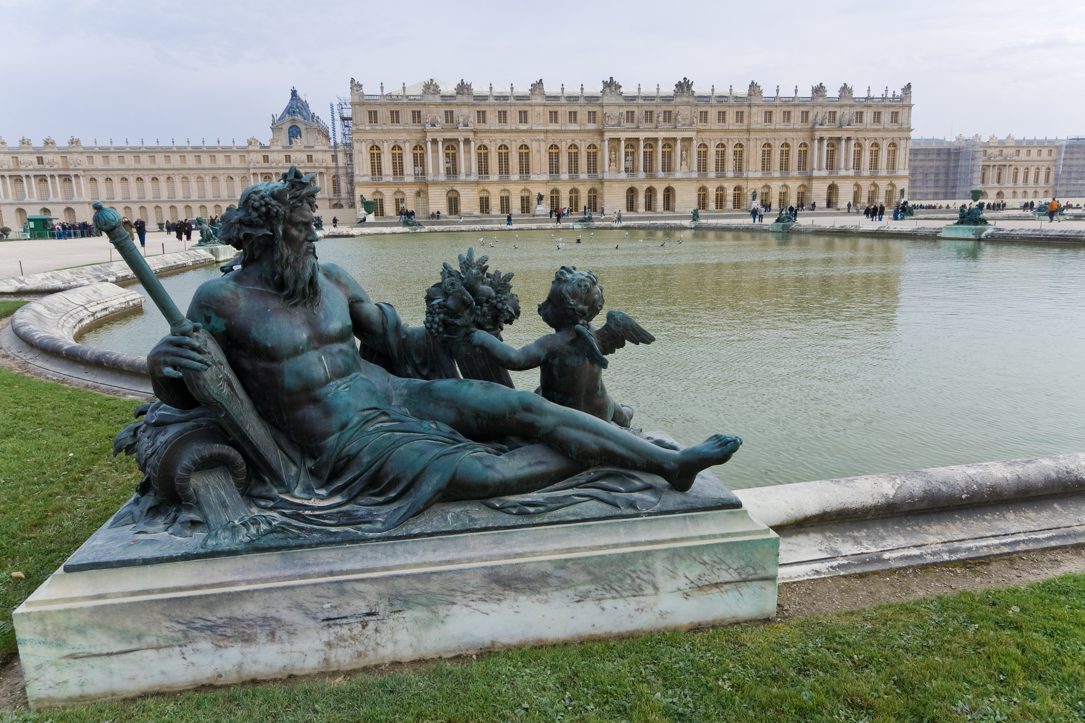 Étienne Le Hongre (Français, 1628-1690): La Seine, XVIIe s., bronze fondu par les frères Keller et placé sur la margelle occidentale du Bassin du Nord du Parterre d'Eau des jardins de Versailles, et façade ouest du château de Versailles